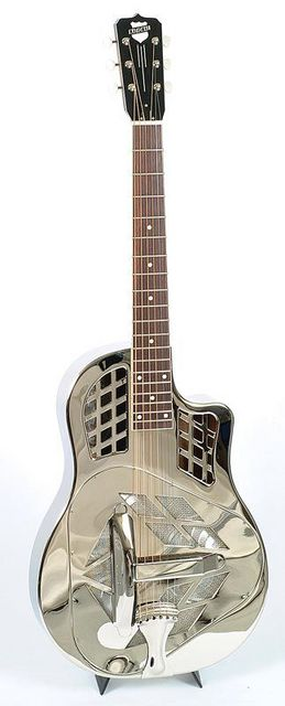 resonator guitar, dobro guitar